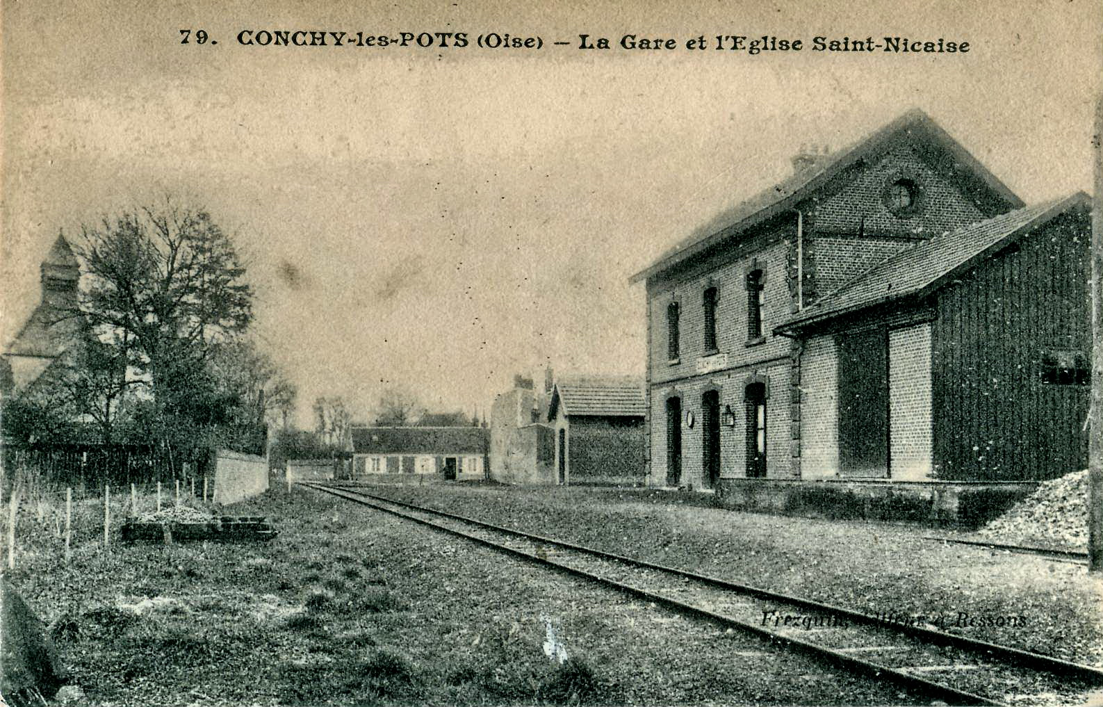 Carte postale ancienne éditée par Frezquin, N°79Conchy-les-Pots : La Gare et l'église Saint-Nicaise